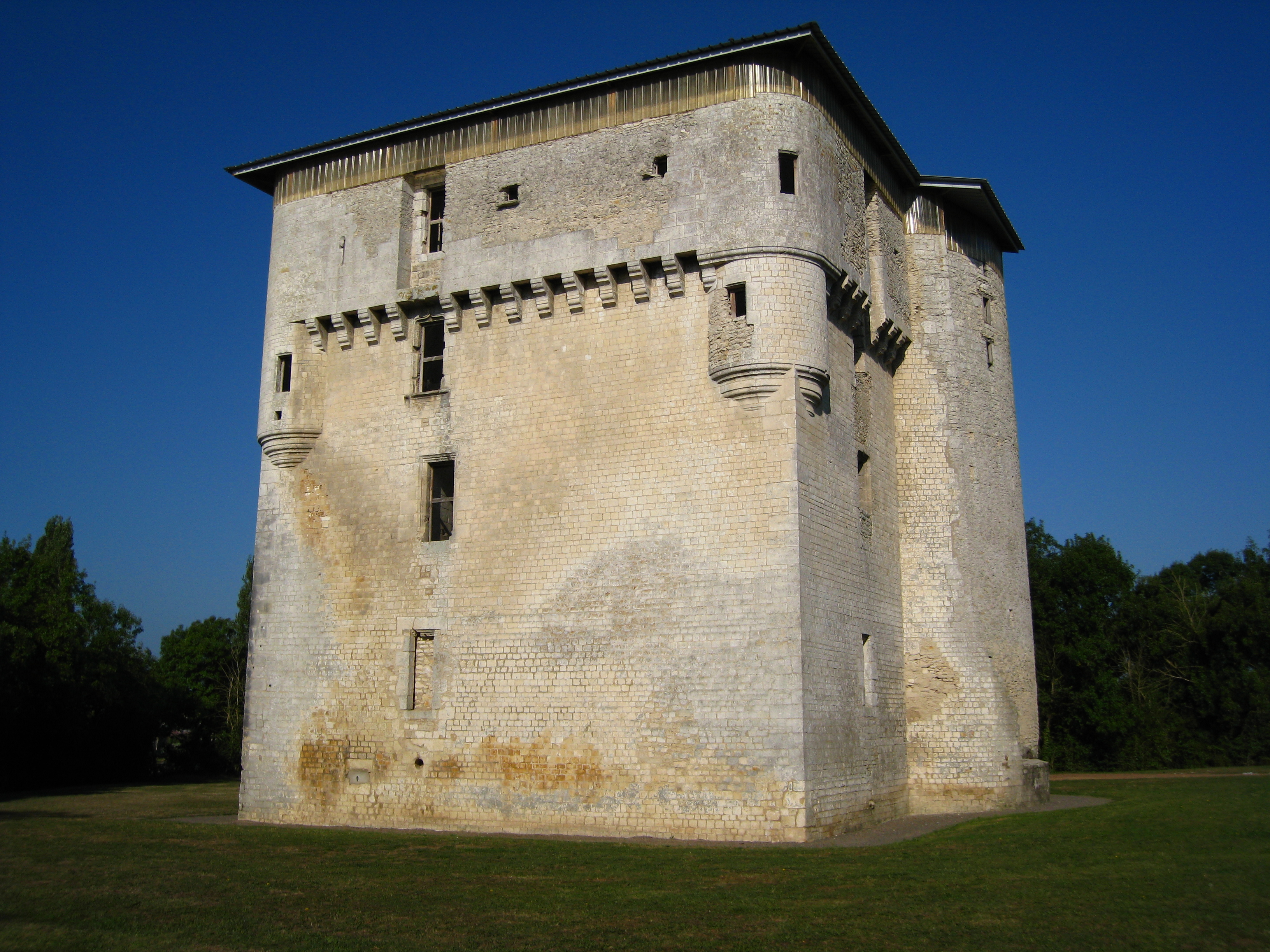 Tour de Moricq (commune d'Angles) en Vendée